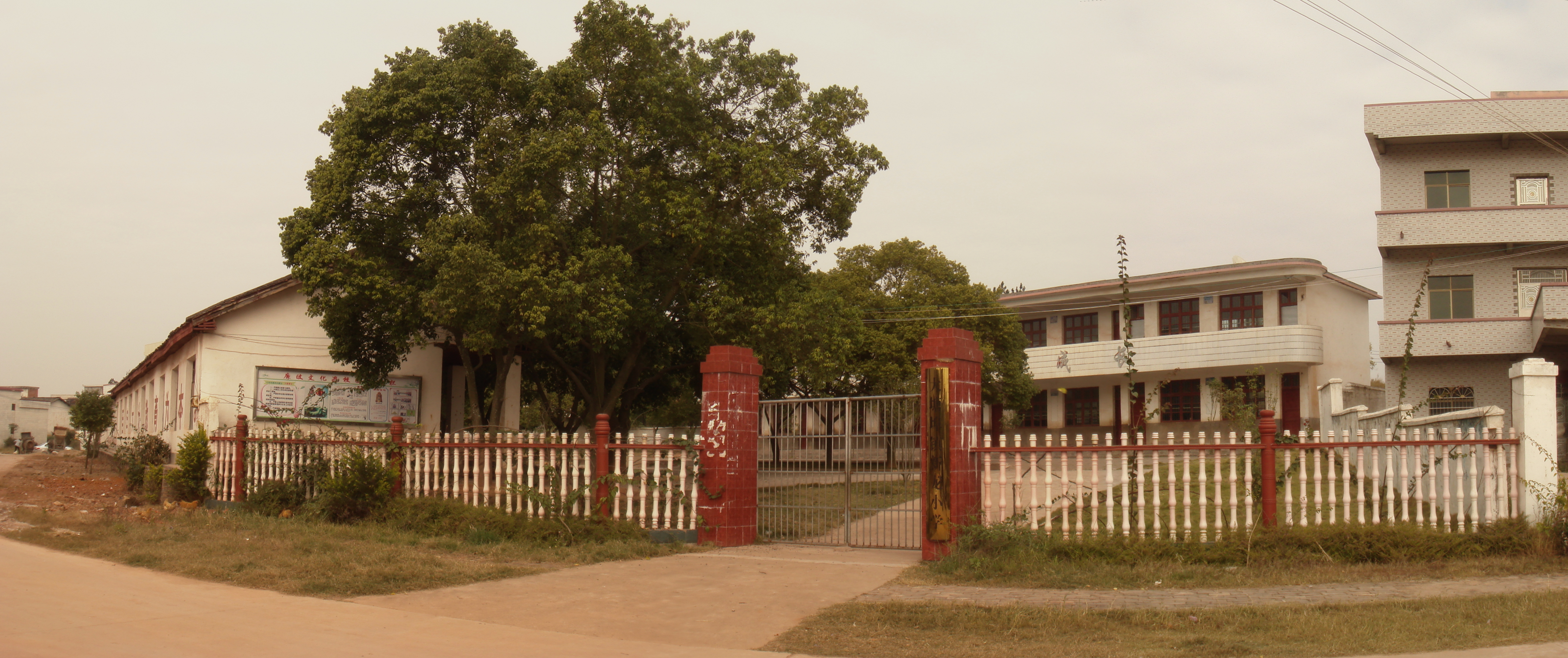 信丰大塘埠镇新龙小学